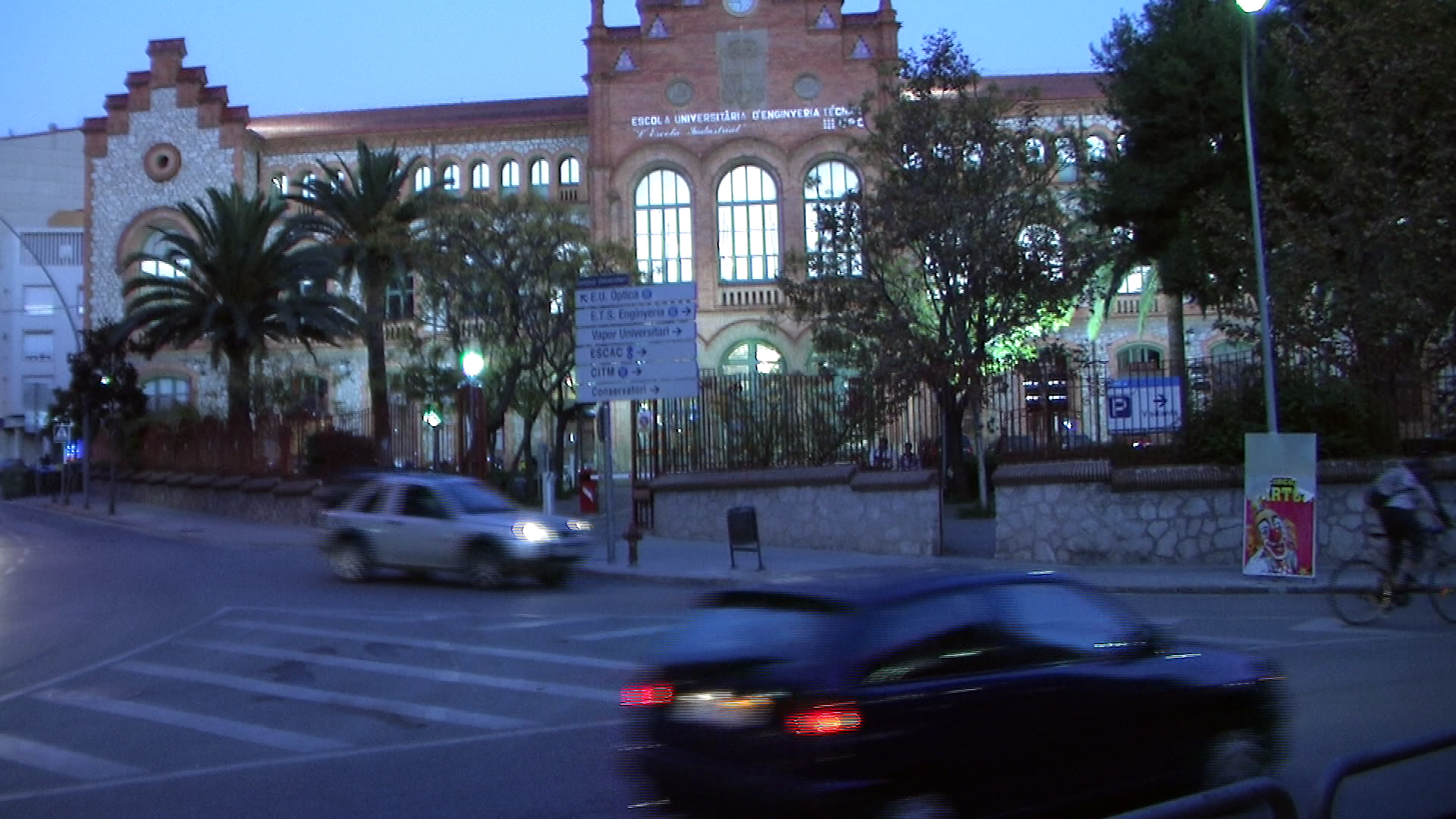 Fotograma d'un vídeo gravat amb resolució de 1080i de la zona universitària de l'EUETIT a Terrassa. Gravat amb la finalitat de veure-hi el mode entrellaçat a través d'un monitor de PC (és a dir progressiu), veure-hi l'"efecte pinta".